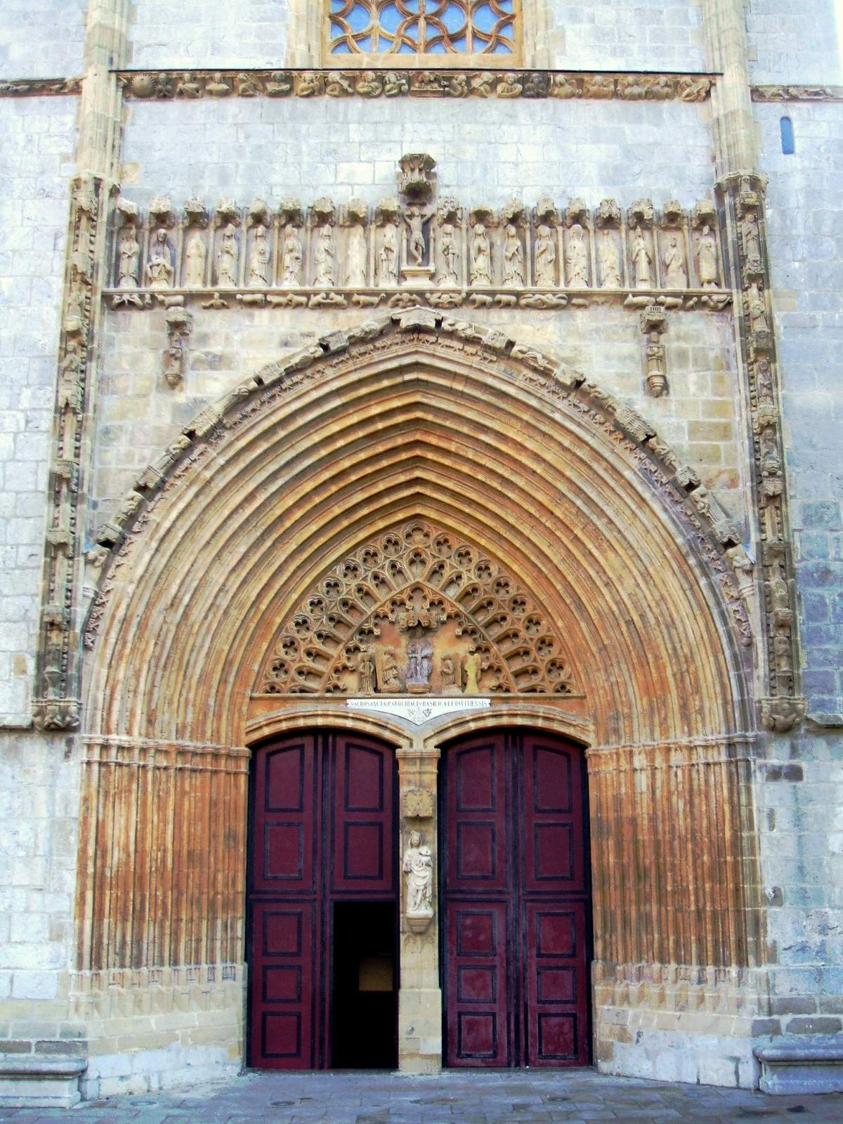 Portada principal gótica (siglo XV) de la Basílica de la Asunción de Nuestra Señora, Lequeitio (Vizcaya, País Vasco, España)